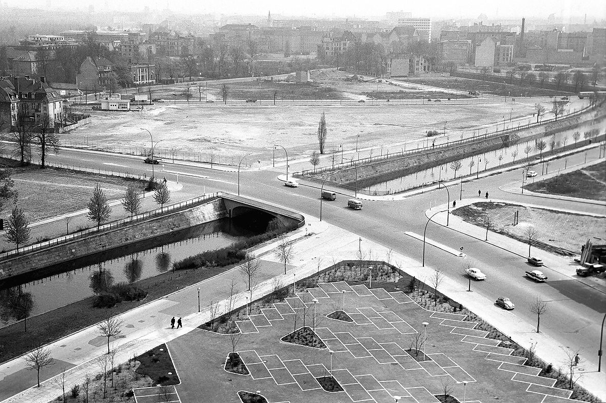 Blick vom Hilton-Hotel auf die Corneliusbrücke in Berlin-Tiergarten.